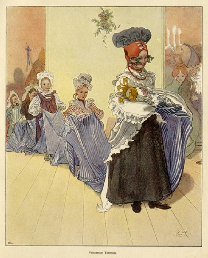 Picture from the book Topelius, Zacharias: (1901-1903). Läsning för barn. Stockholm: Bonnier